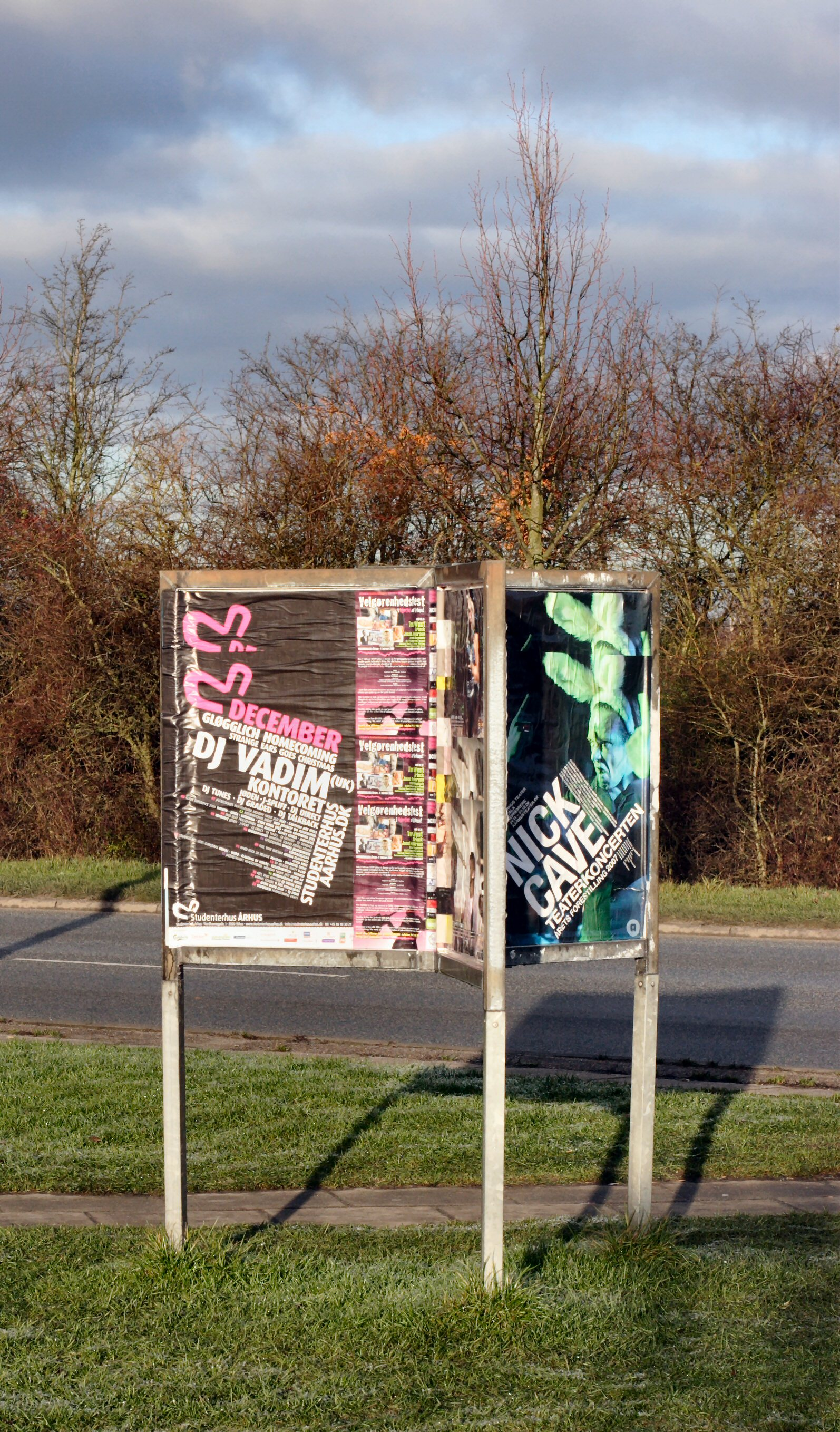 Plakatsøjle i Århus, Denmark